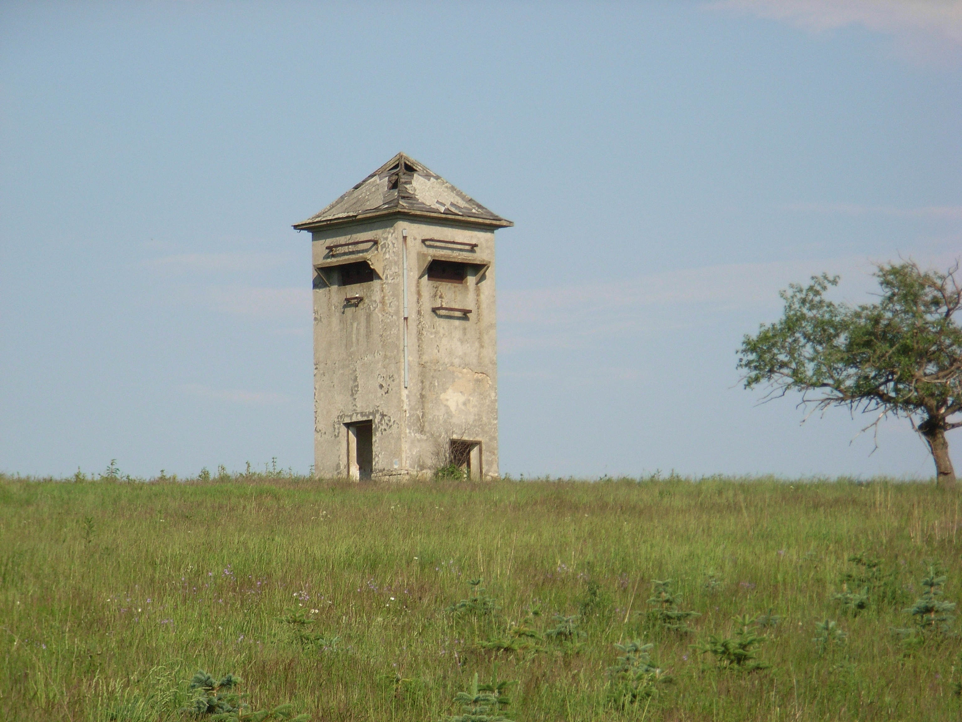 letztes Bauwerk von Mackov